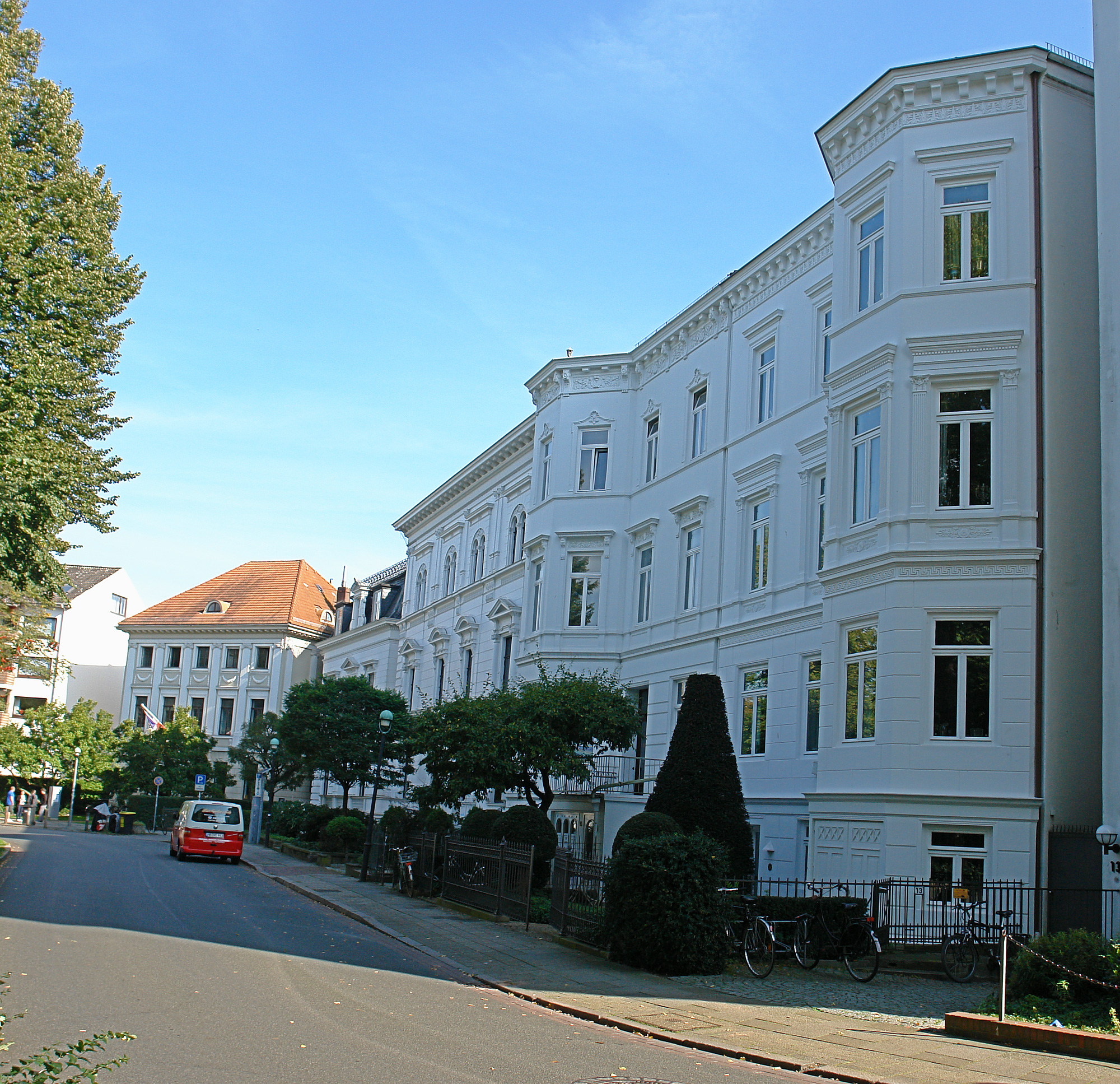 Ensemble Contrescarpe, Kohlhökerstraße, Meinkenstraße, Rutenstraße in Bremen.Die Denkmalgruppe ist ein geschütztes Kulturdenkmal in der Freien Hansestadt Bremen, mit der Nr. 0277 beim Landesamt für Denkmalpflege registriert.